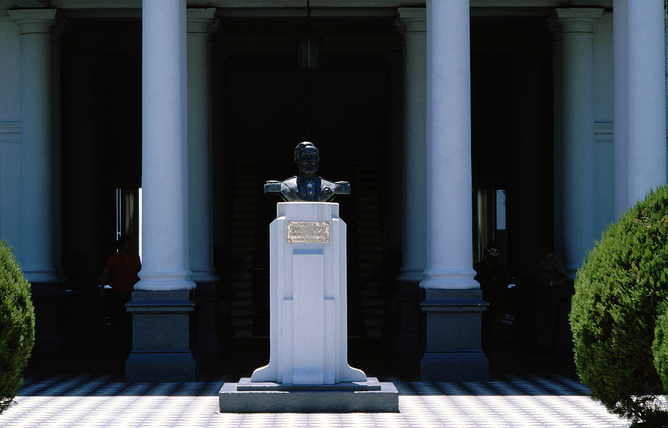 Büste von Francisco S. Lopez, Paraguay